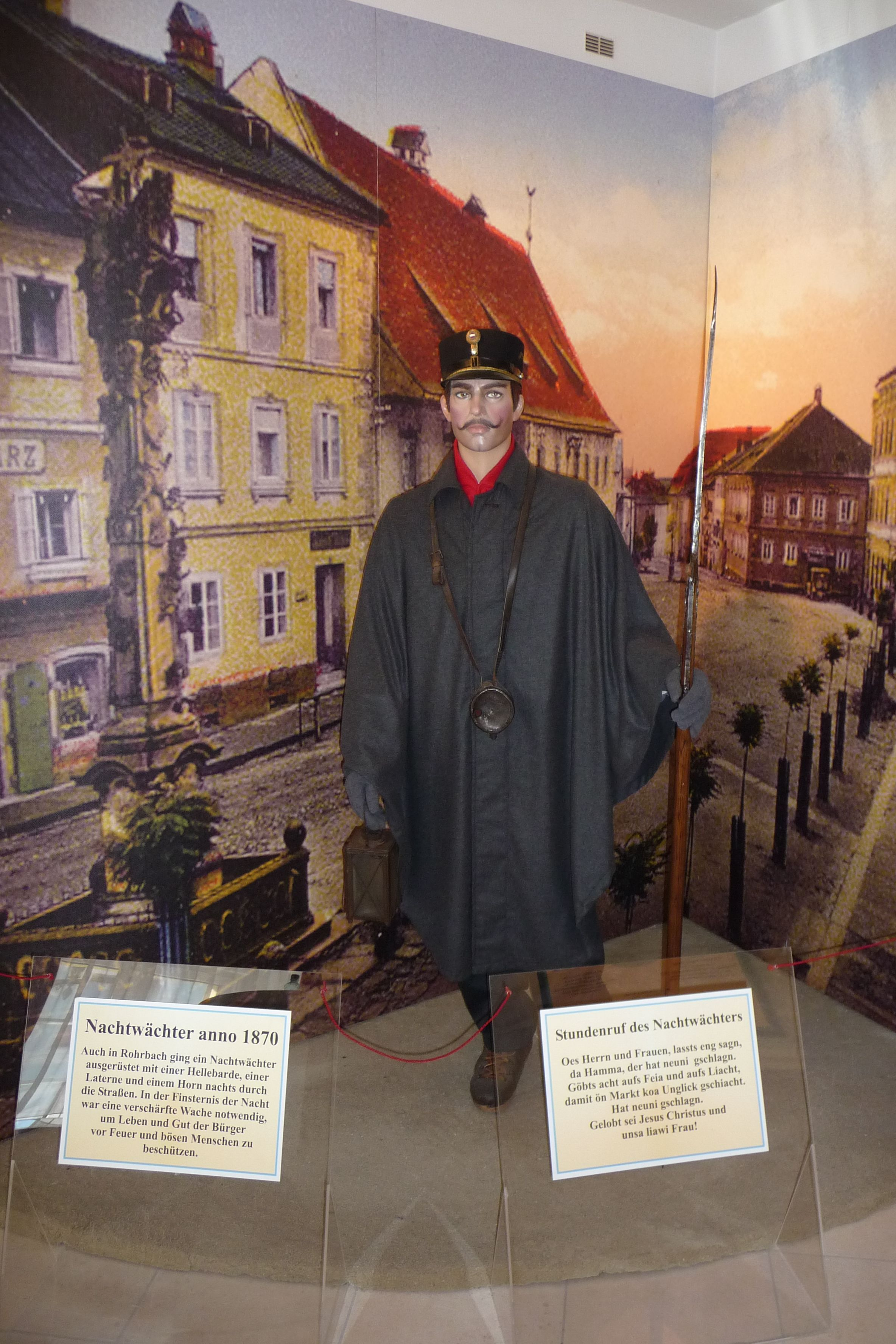 Nachtwächter in Rohrbach (ausgestellt im Stadtgeschichteraum)